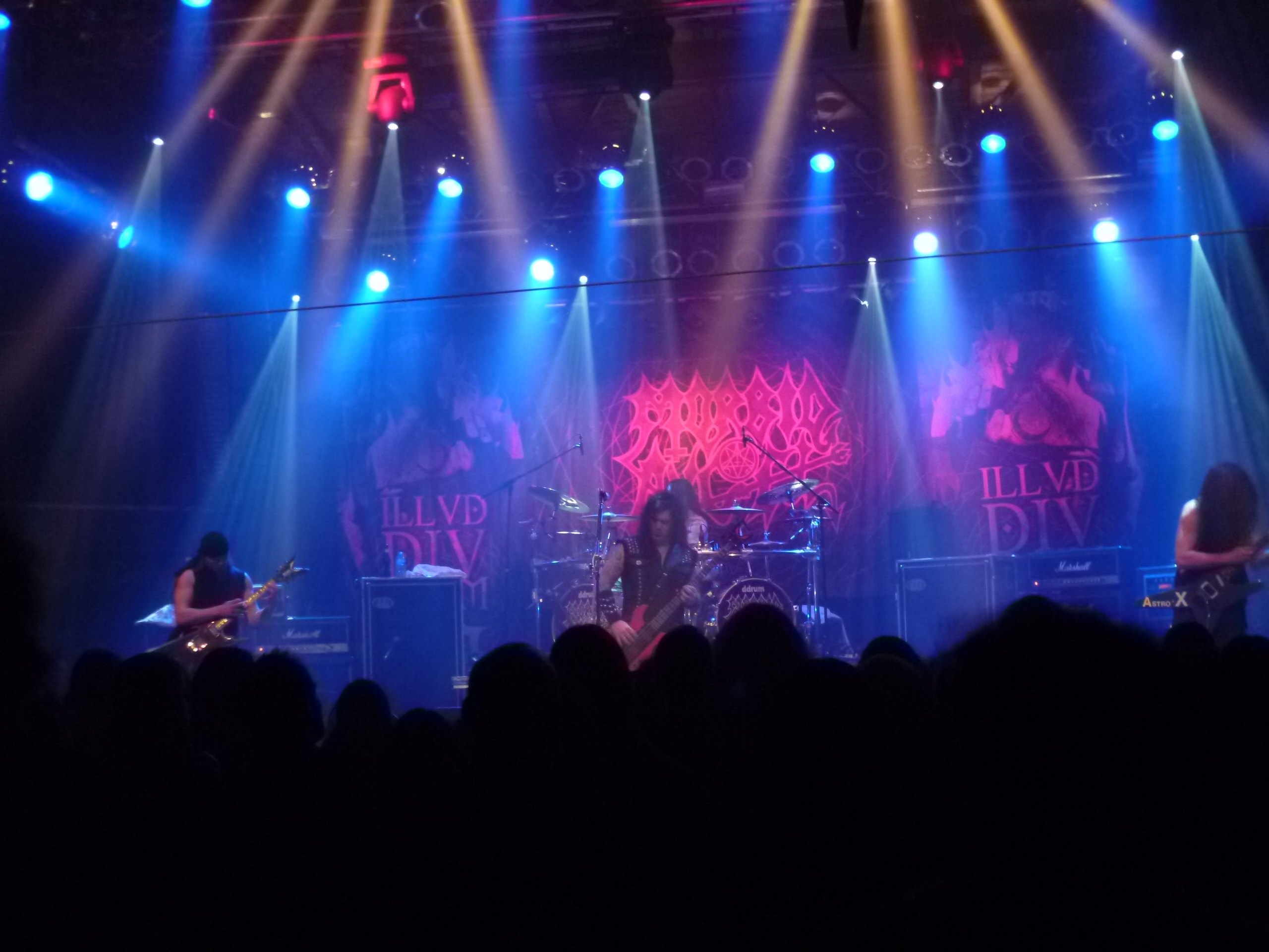 Morbid Angel live in der Garage Saarbrücken